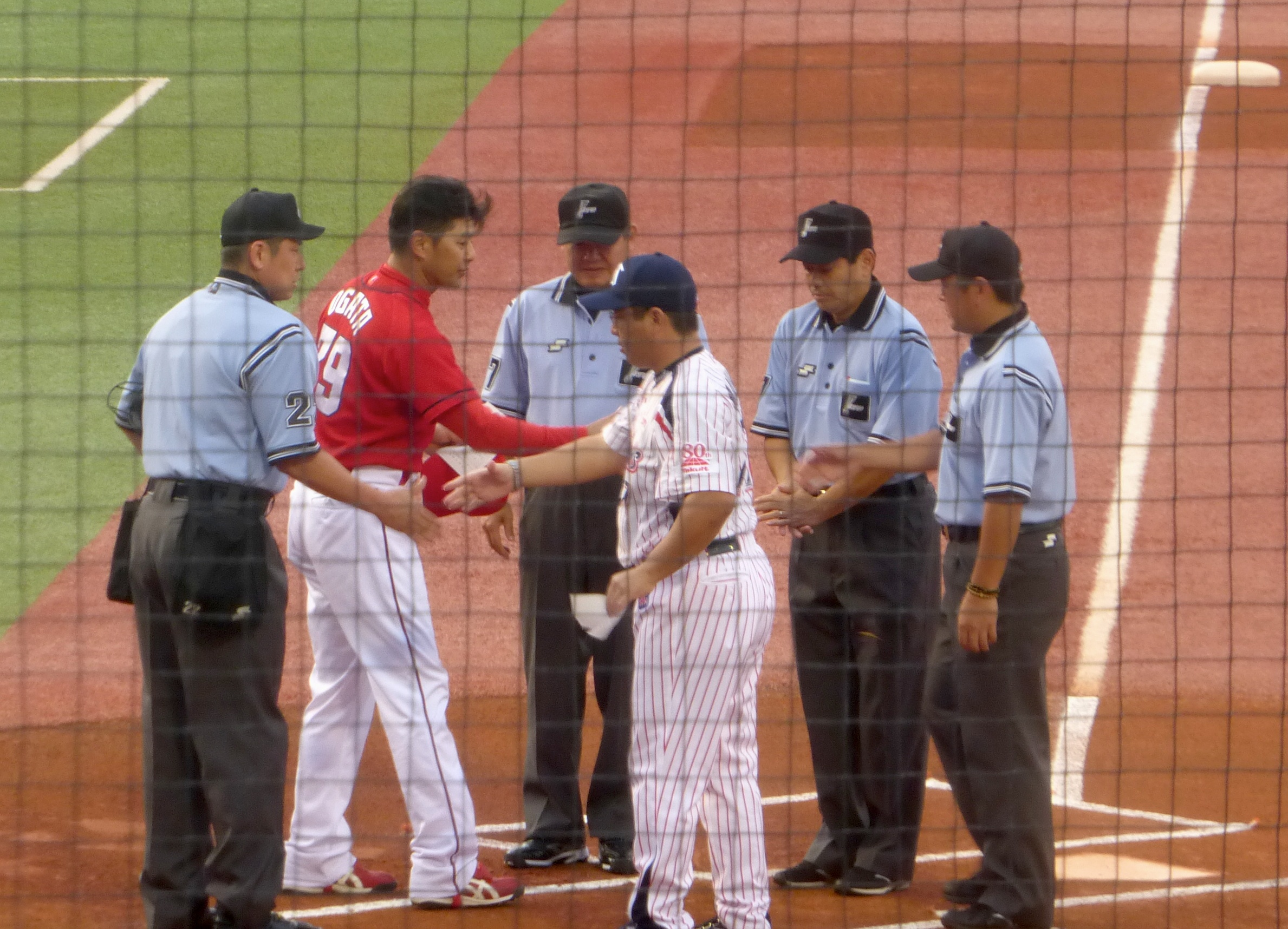 緒方孝市と真中満 (Koichi Ogata and Mitsuru Manaka)